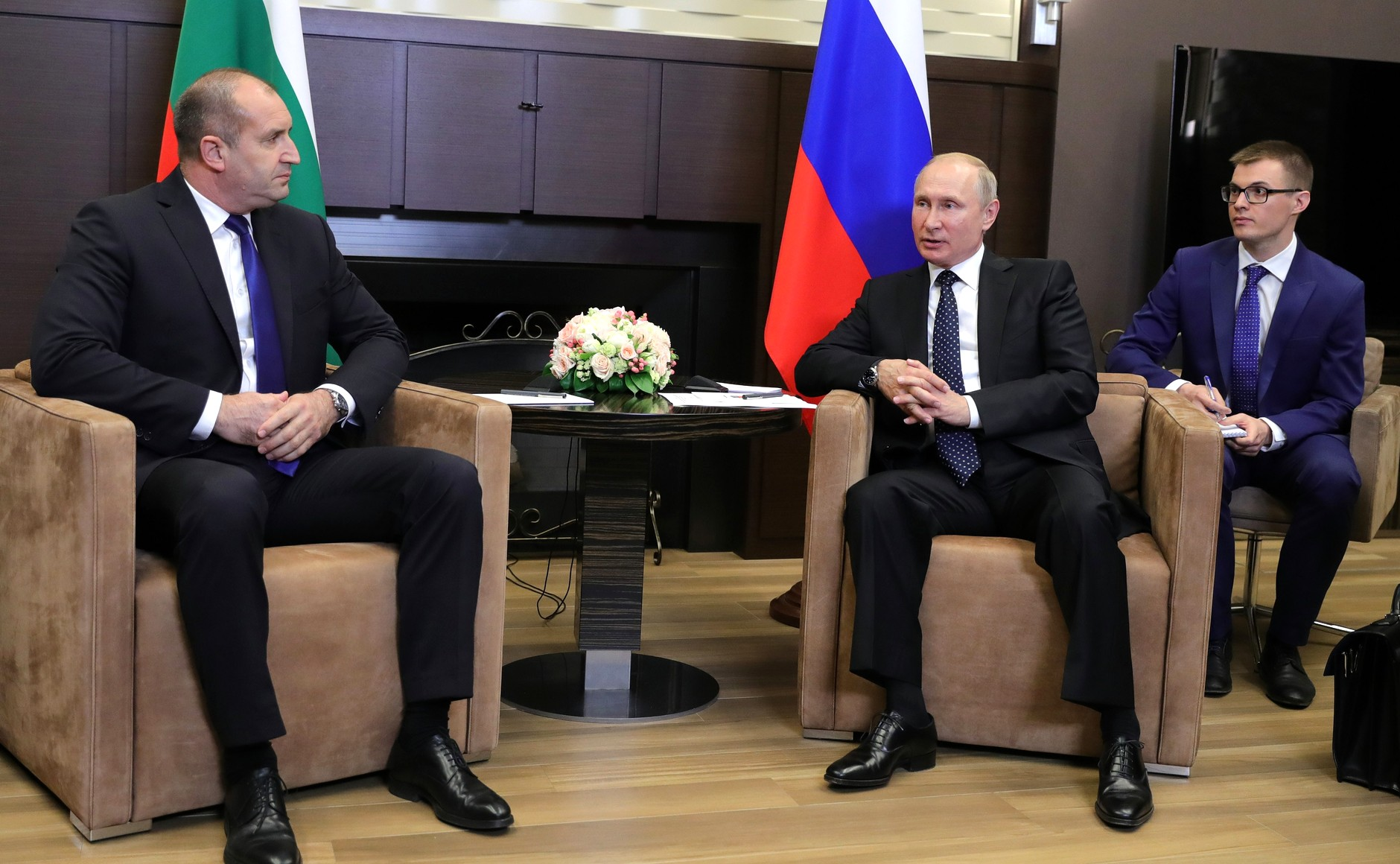 Встреча Президента России Владимира Путина с Президентом Болгарии Руменом Радевым